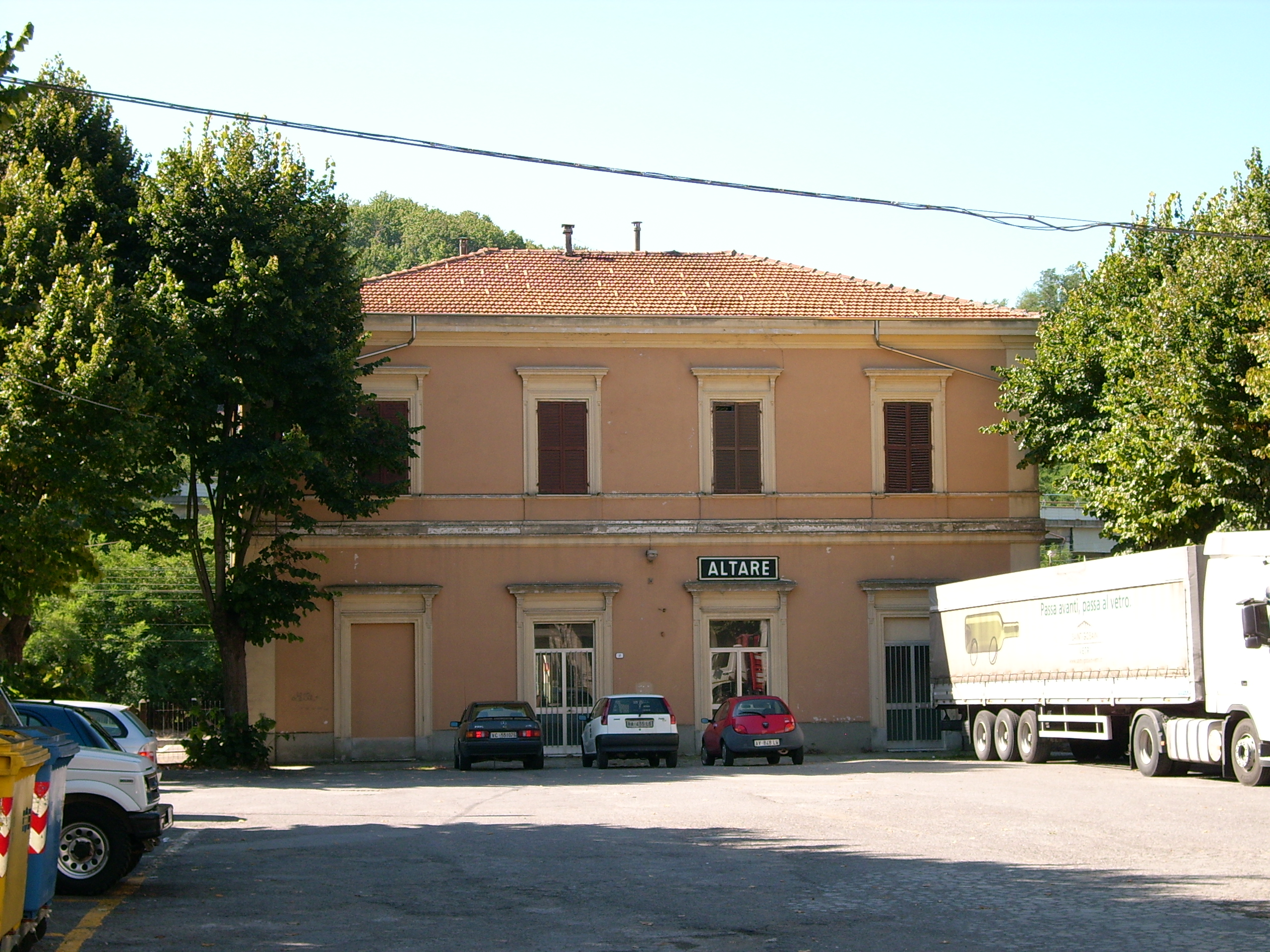 Stazione Ferroviara di Altare, Liguria, Italia